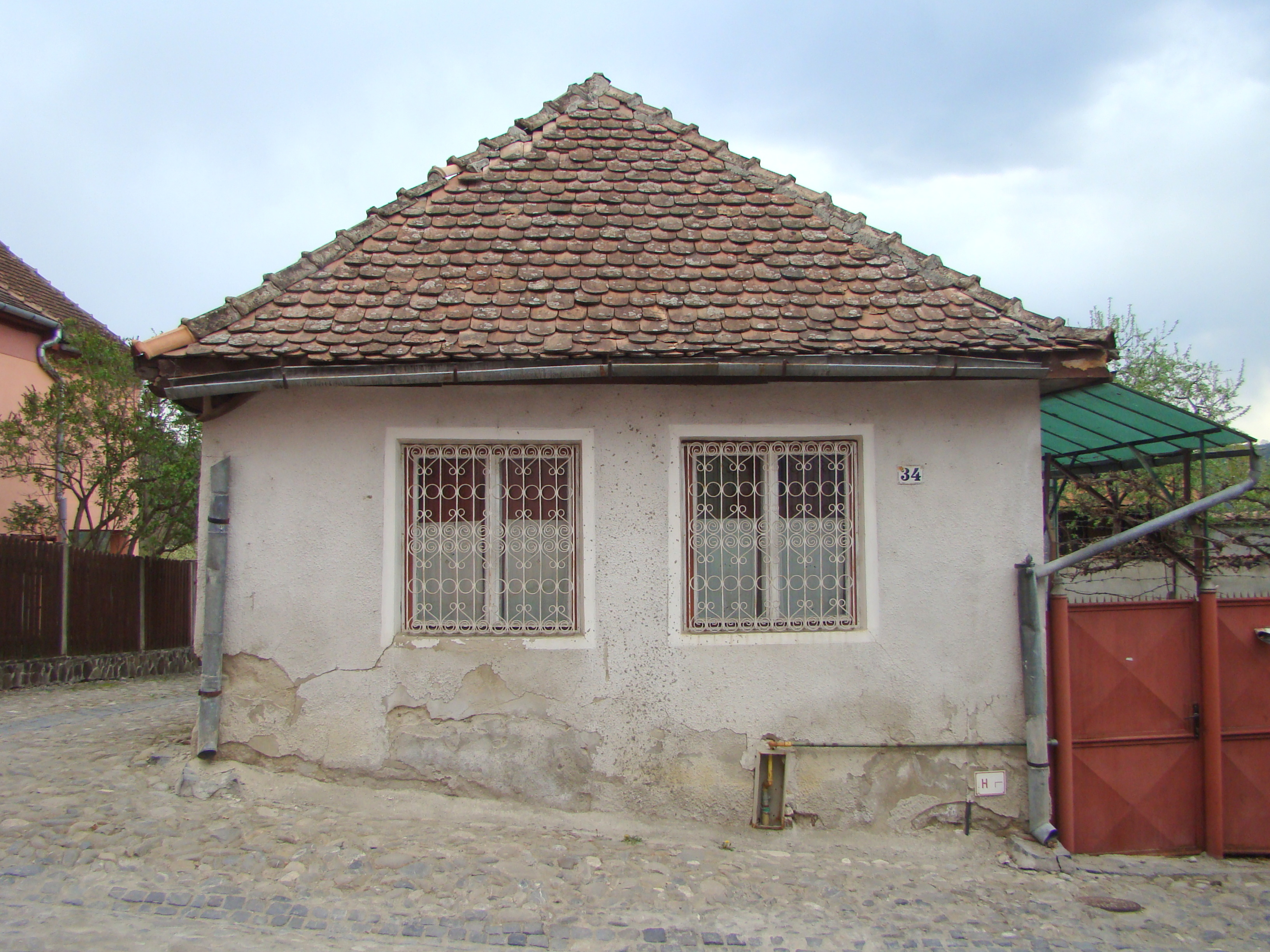 Casa Gross, municipiul Sighișoara, str. Tâmplarilor 34 sec. XVII